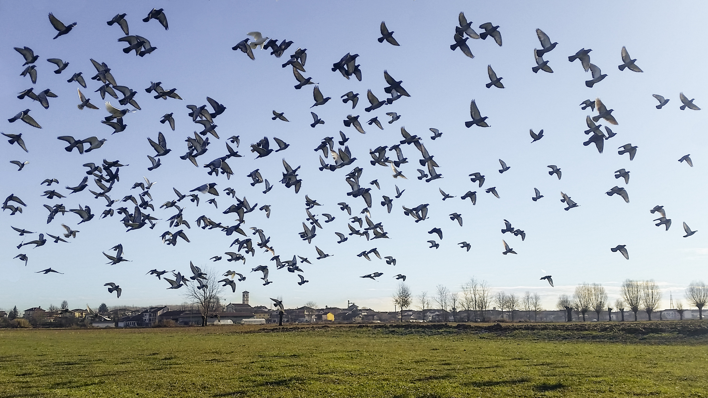 Paesaggio invernale con uccelli di borgo San Michele e Grato a Carmagnola. Skyline da via Tosi.